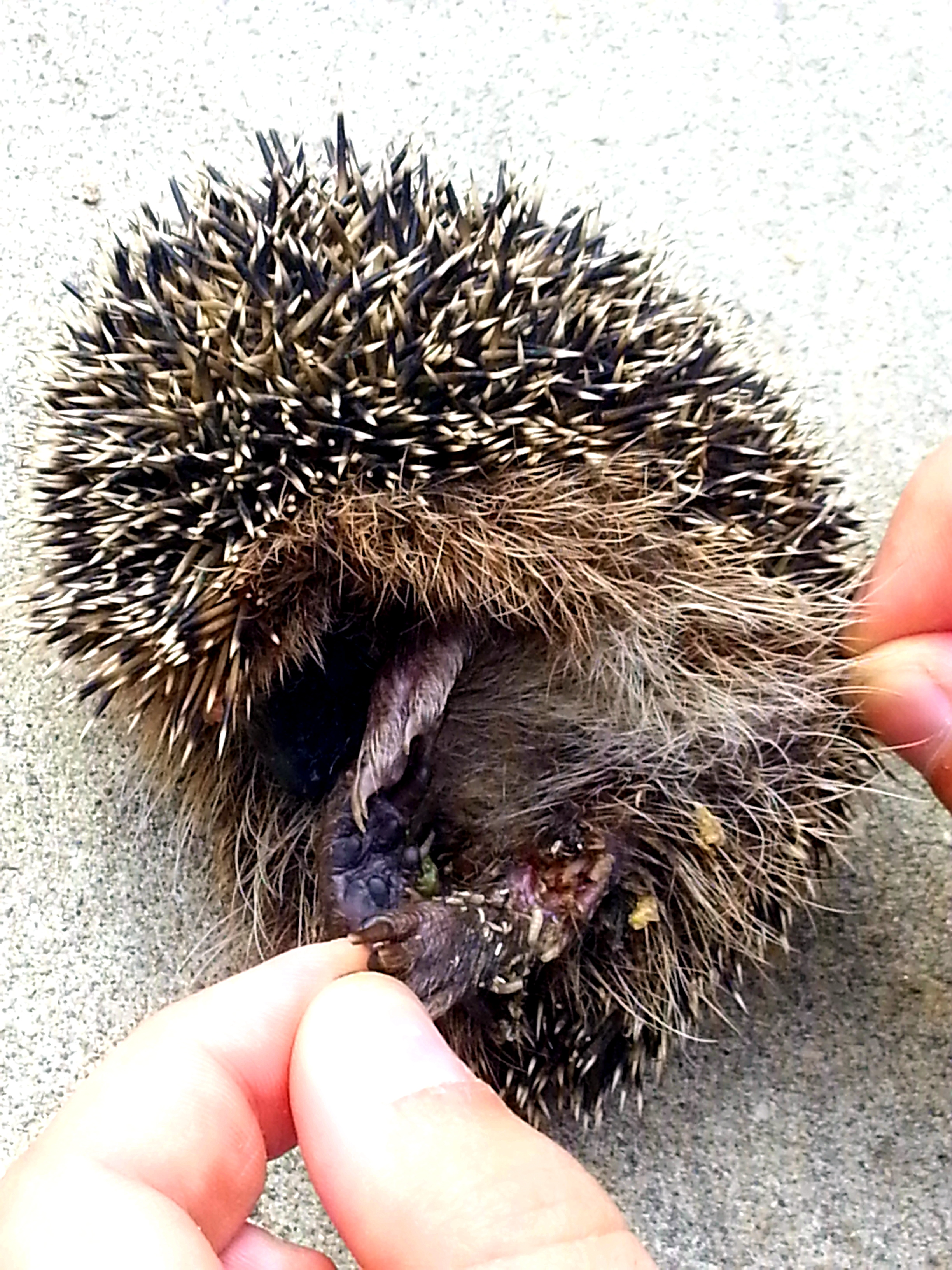 Miasi su Erinaceus europaeus